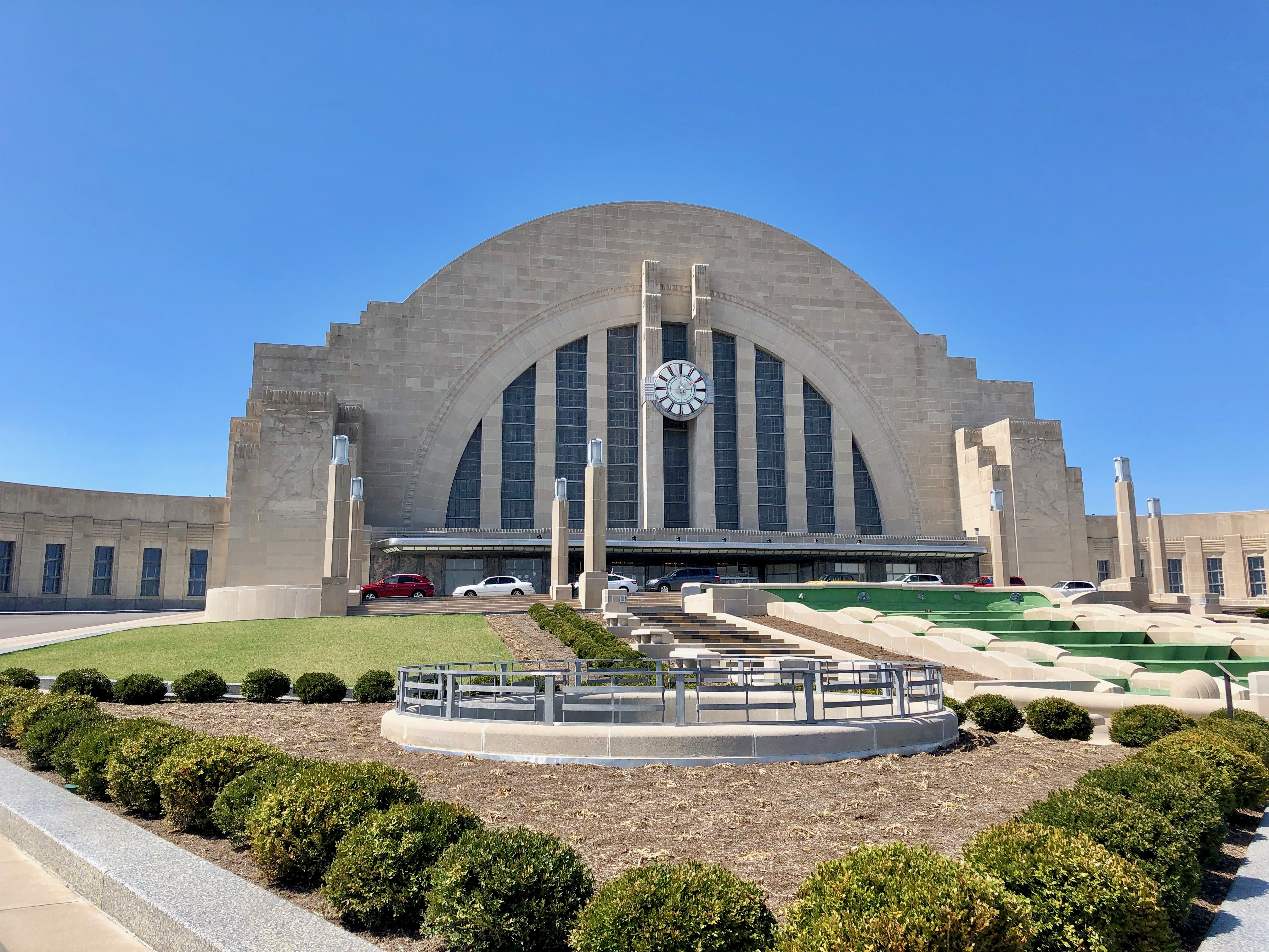 Cincinnati Union Terminal, Queensgate, Cincinnati, OH